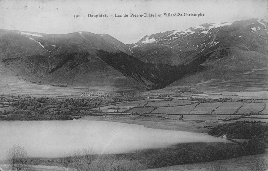 Villard-Saint-Christophe et lac de Pierre-Chatel, Isère, France.